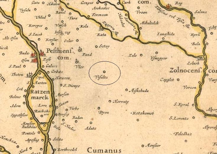 Theatrum Orbis Terrarum, sive Atlas Novus in quo Tabulæ et Descriptiones Omnium Regionum, Editæ a Guiljel et Ioanne Blaeu (térképrészlet)